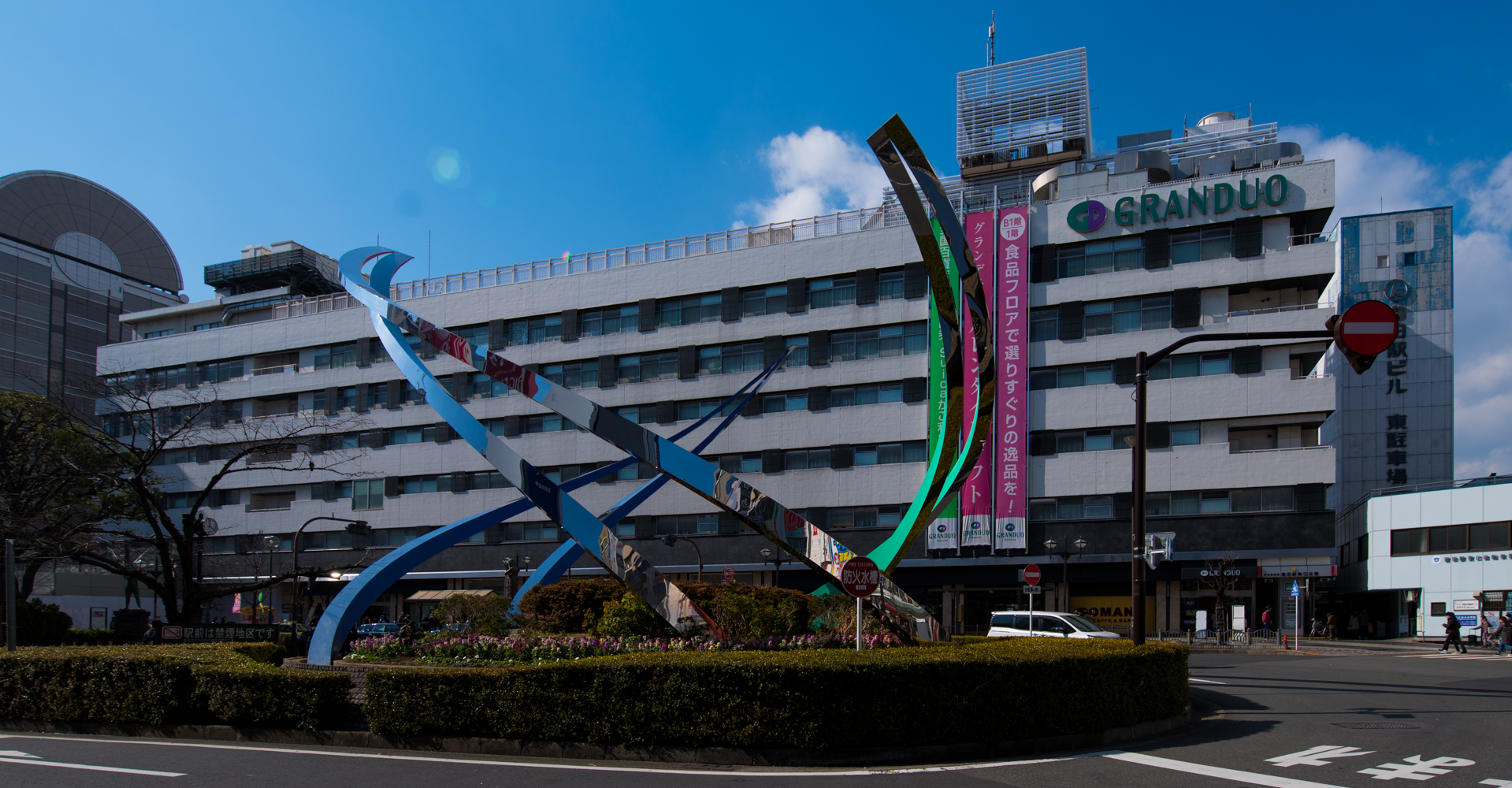 東日本旅客鉄道株式会社京浜東北線（東海道本線）蒲田駅東口駅舎（グランデュオ東館）